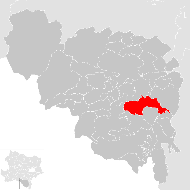 Bezirk Neunkirchen